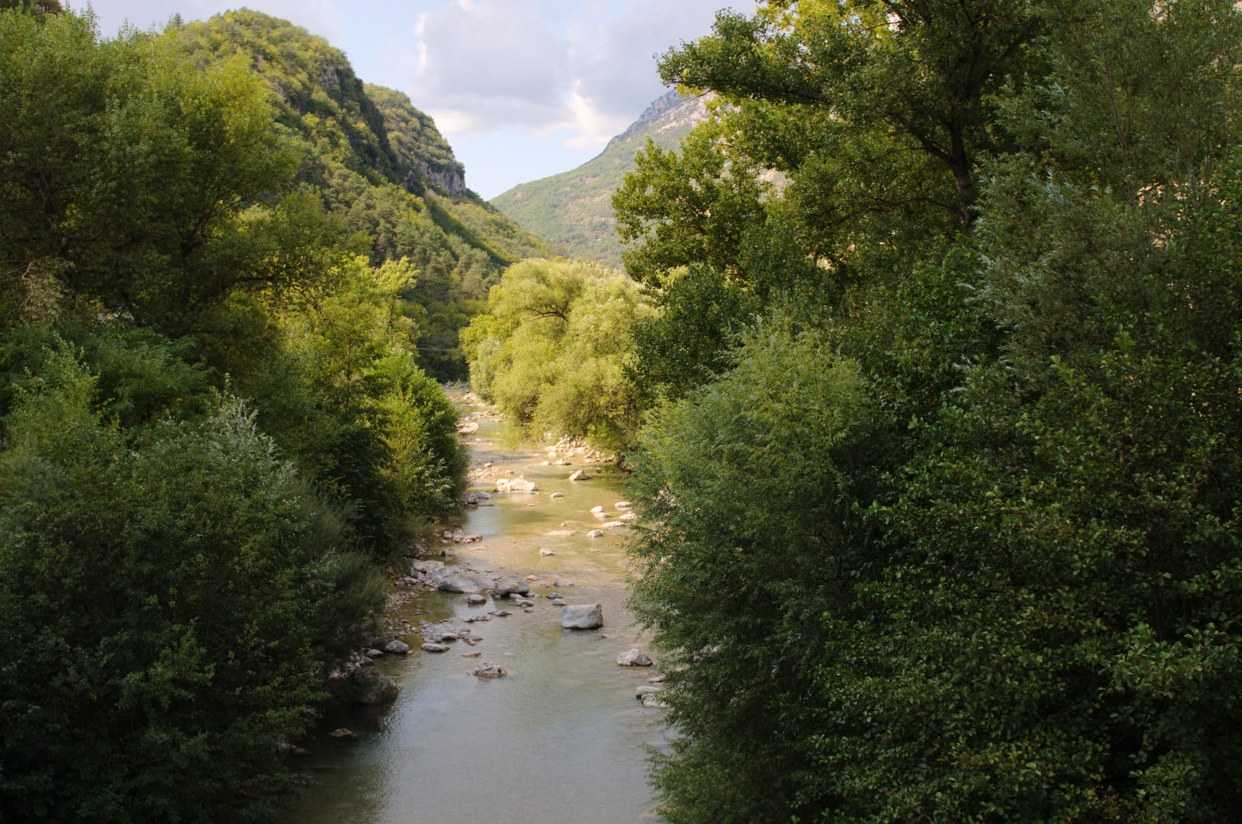 L'Estéron entre Roquesteron et Roquestéron-Grasse